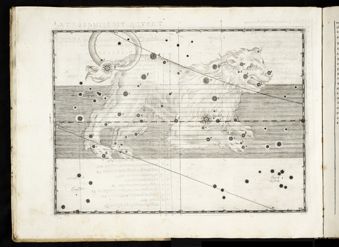 Ilustracion de la constelacion de Leo , en la obra Uranometria de Johann Bayer.